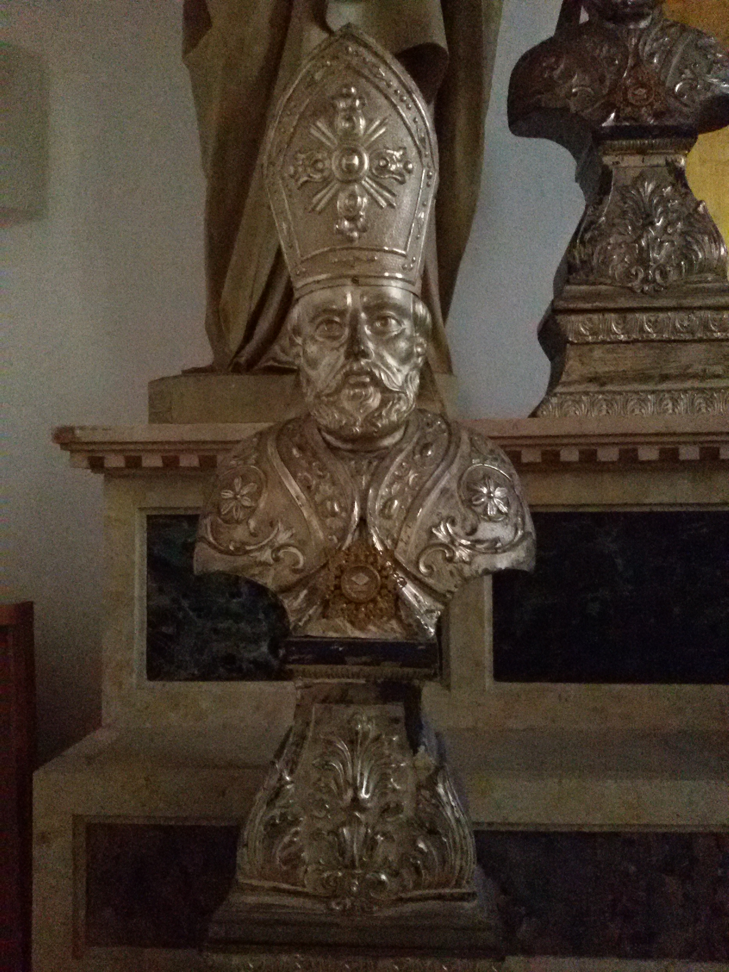 Chiesa di Santa Cristina Quinto di Treviso